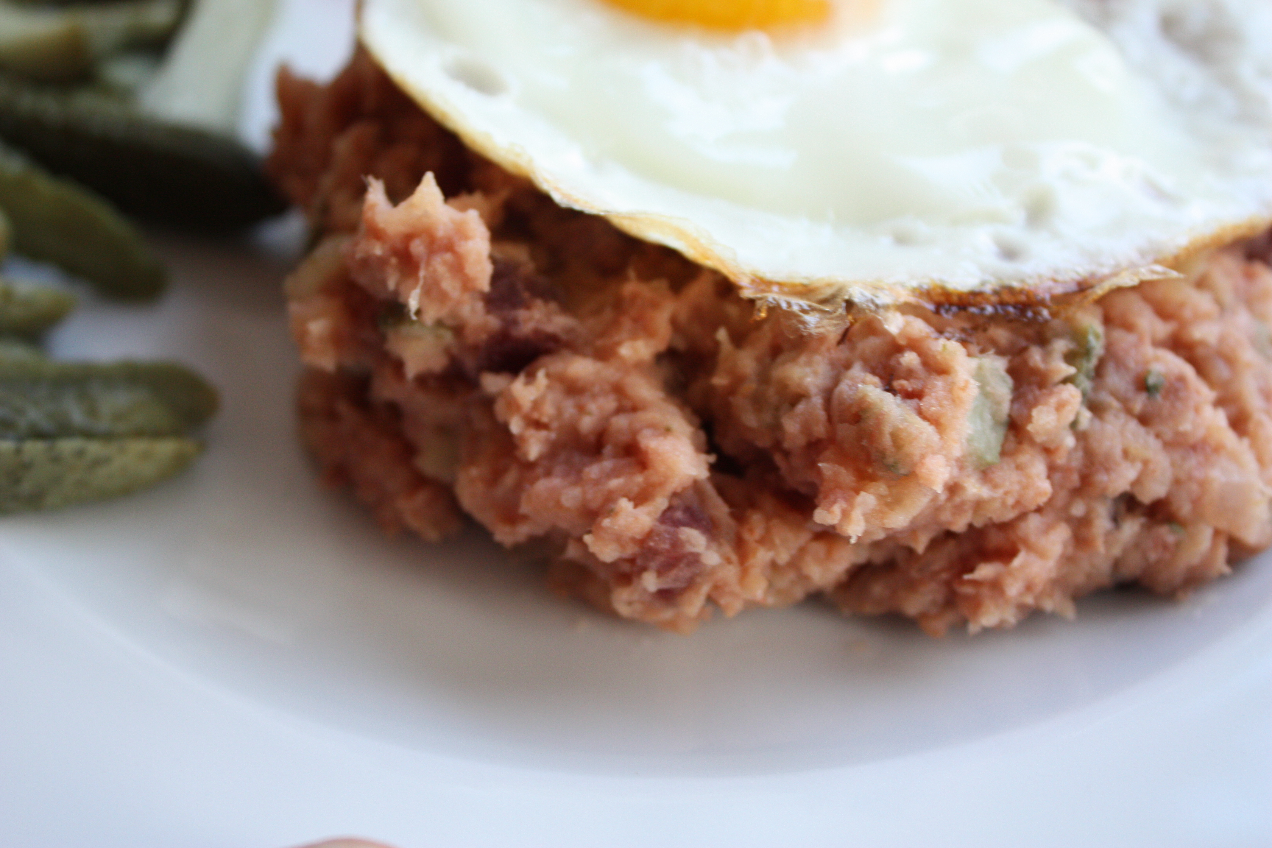 Labskaus; Lapskaus